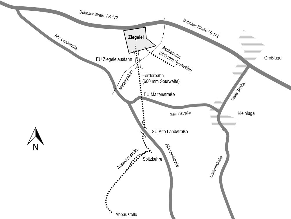 Übersichtskarte Ziegelei Luga